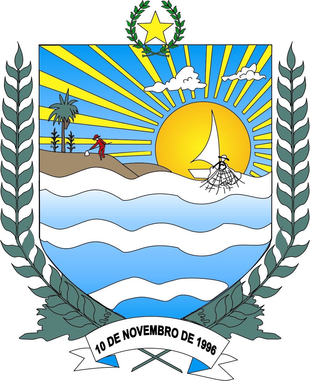 Brasão do município de Conceição do Lago-Açu Maranhão Brasil